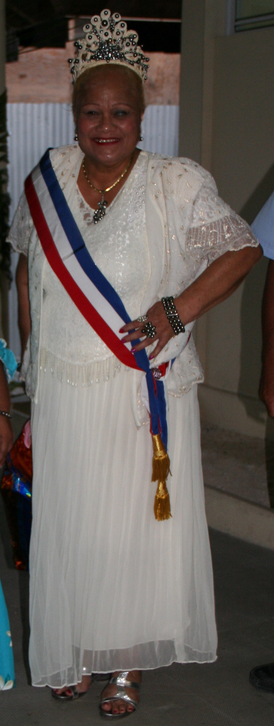 Madame TUKORIO Vahine Suzanne épouse BUTCHER, Maire de Hao, accueille les astronomes à l'occasion de l'éclipse du 11 juillet 2010